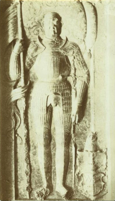 Беларуская (тарашкевіца): Надмагільле Альбэрта Гаштольда (Albert Gaštold)